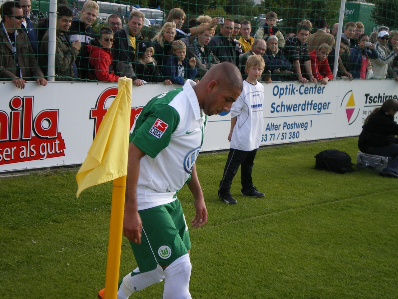 Ashkan Dejagah